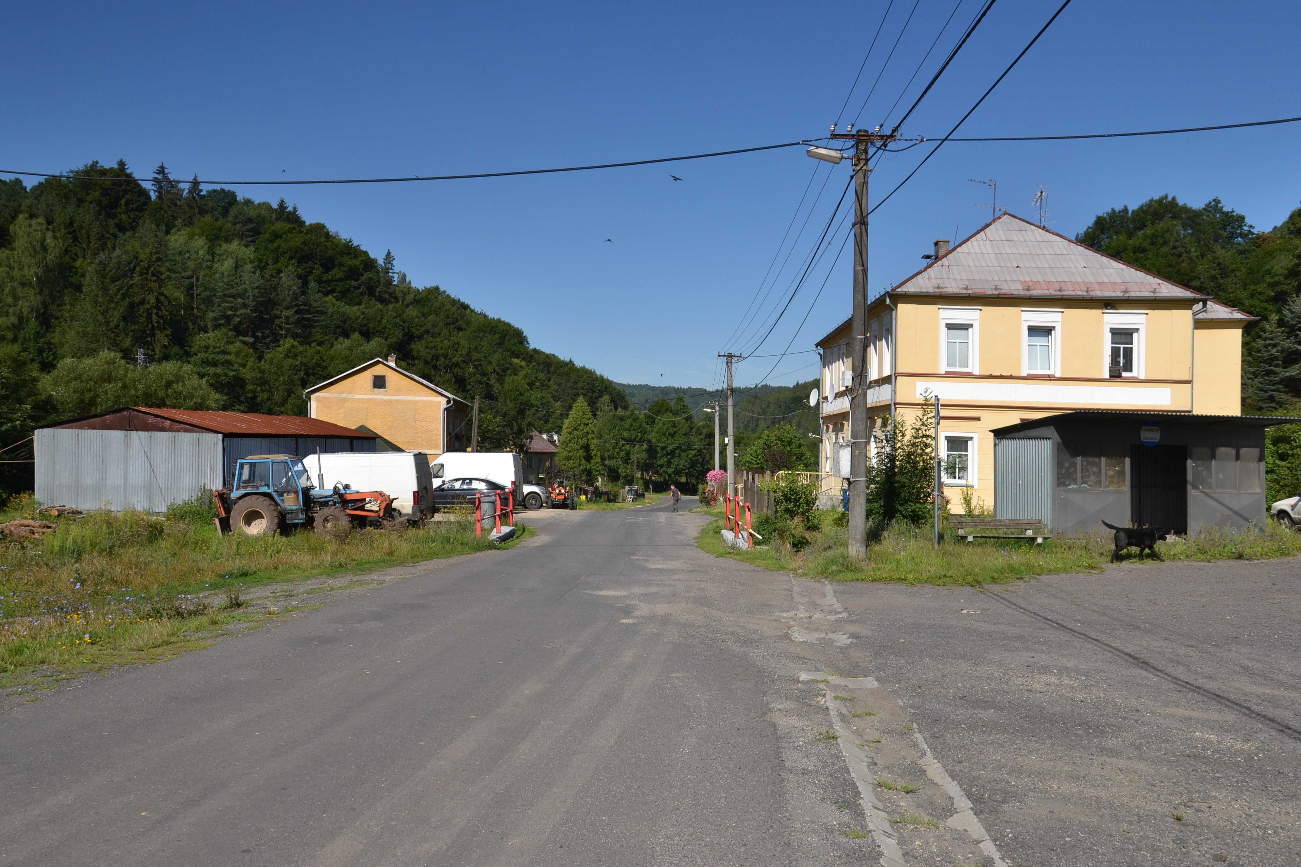 Dolní Lomnice – náves